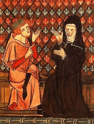 Miniatura medievale dal Roman de la Rose raffigurante Abelardo ed Eloisa